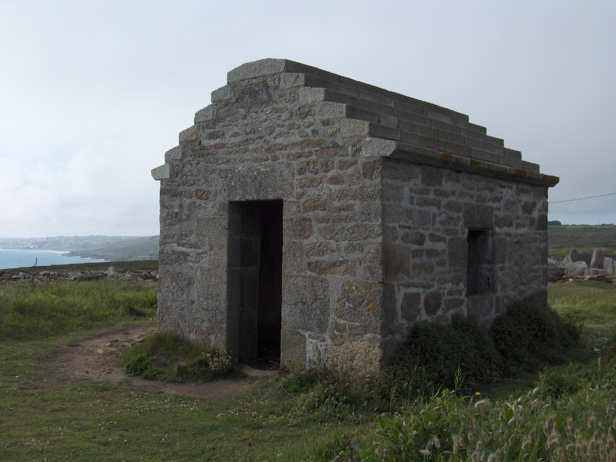 Corps de garde qui, muni de batteries de canons, faisait partie des ouvrages défensifs des côtes françaises, construit en 1747. Désaffecté au XIXe siècle, la ruine est acquise et restaurée par la commune en 1997. .